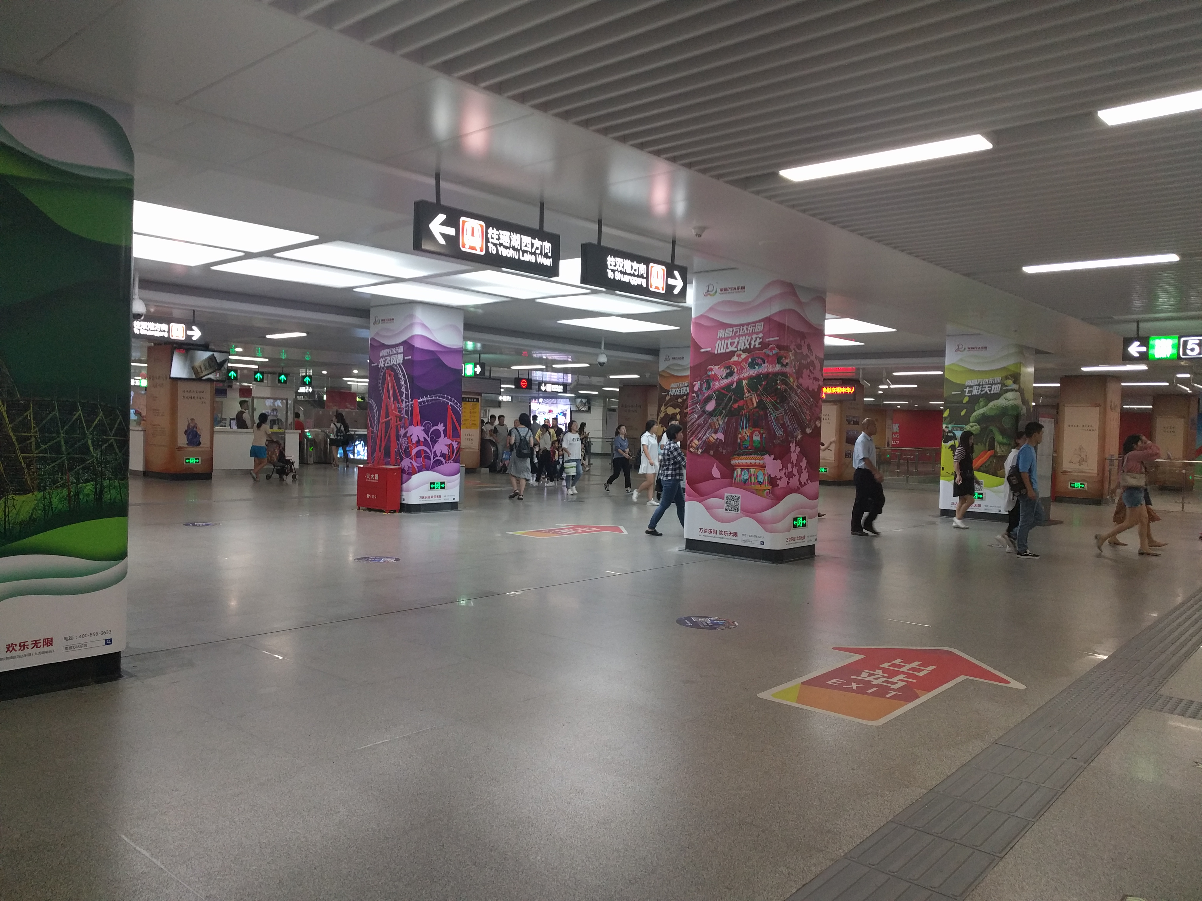 八一馆站站厅